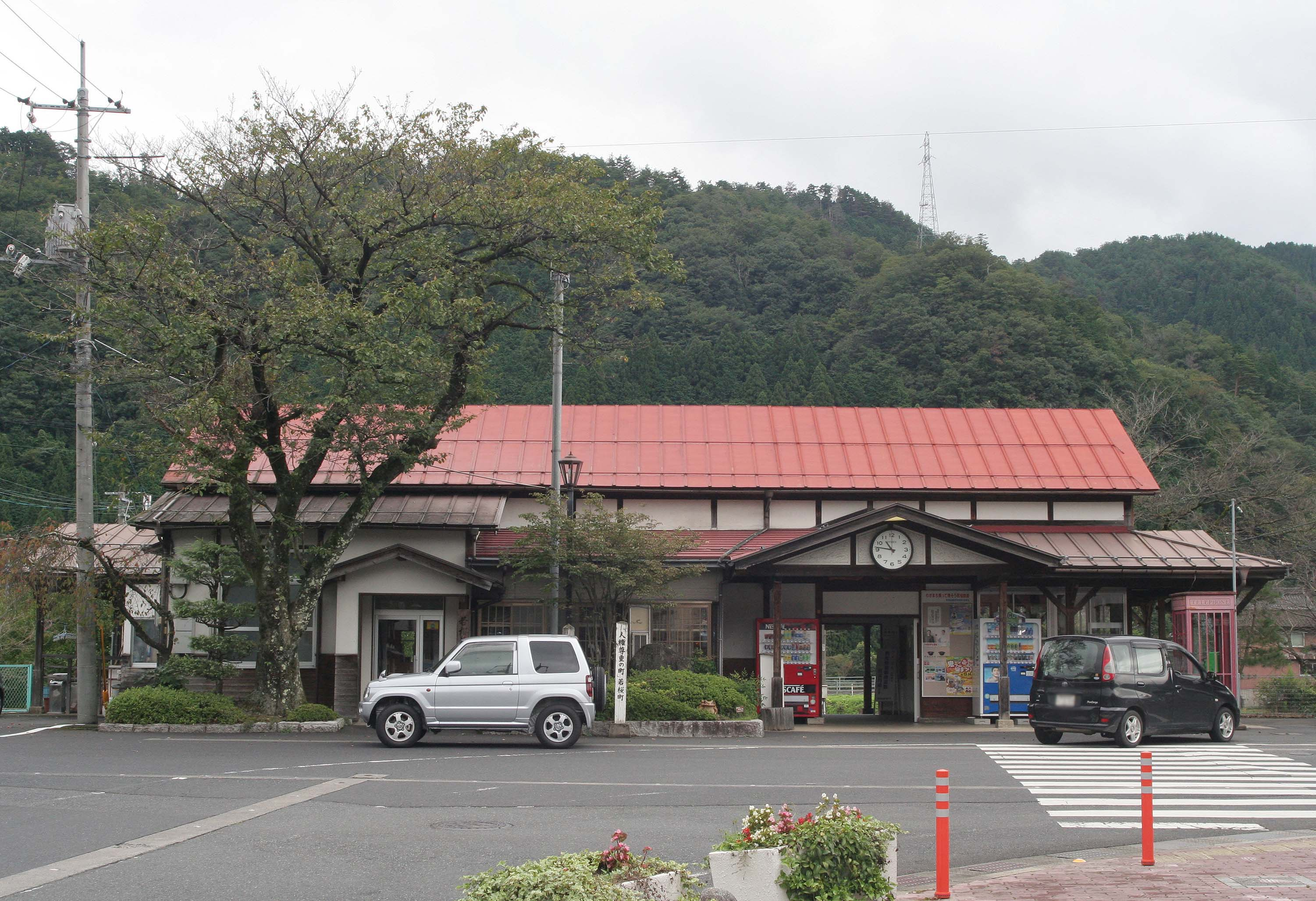 若桜鉄道 若桜駅の駅舎